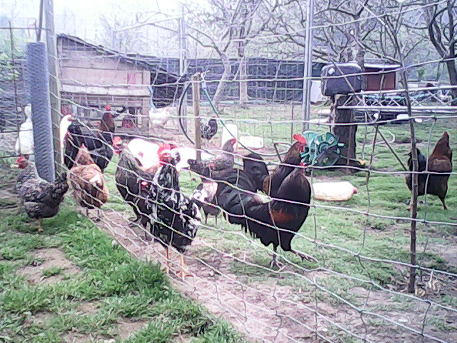 gallinero 2014